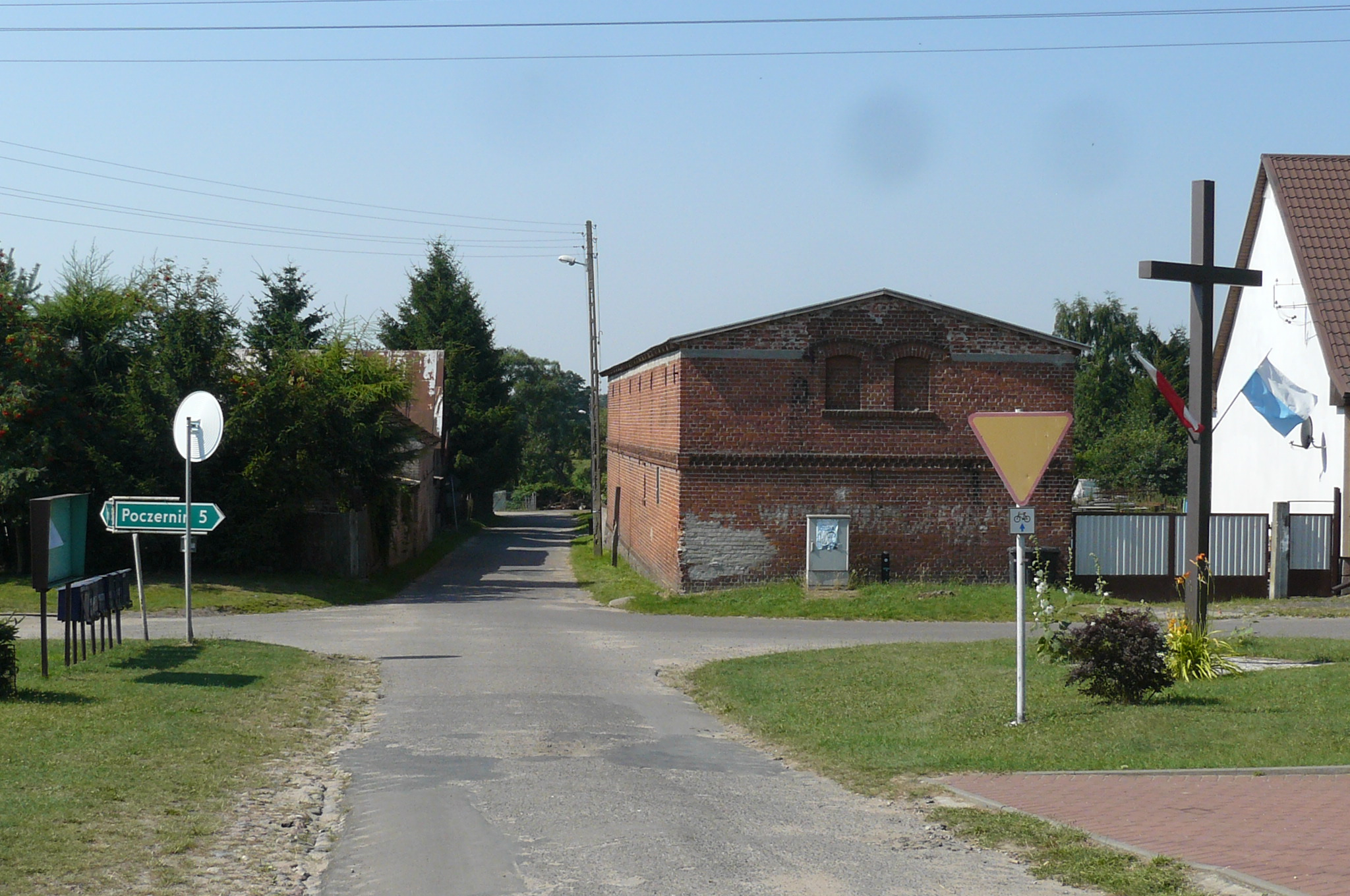 Lubowo koło Stargardu – centrum.